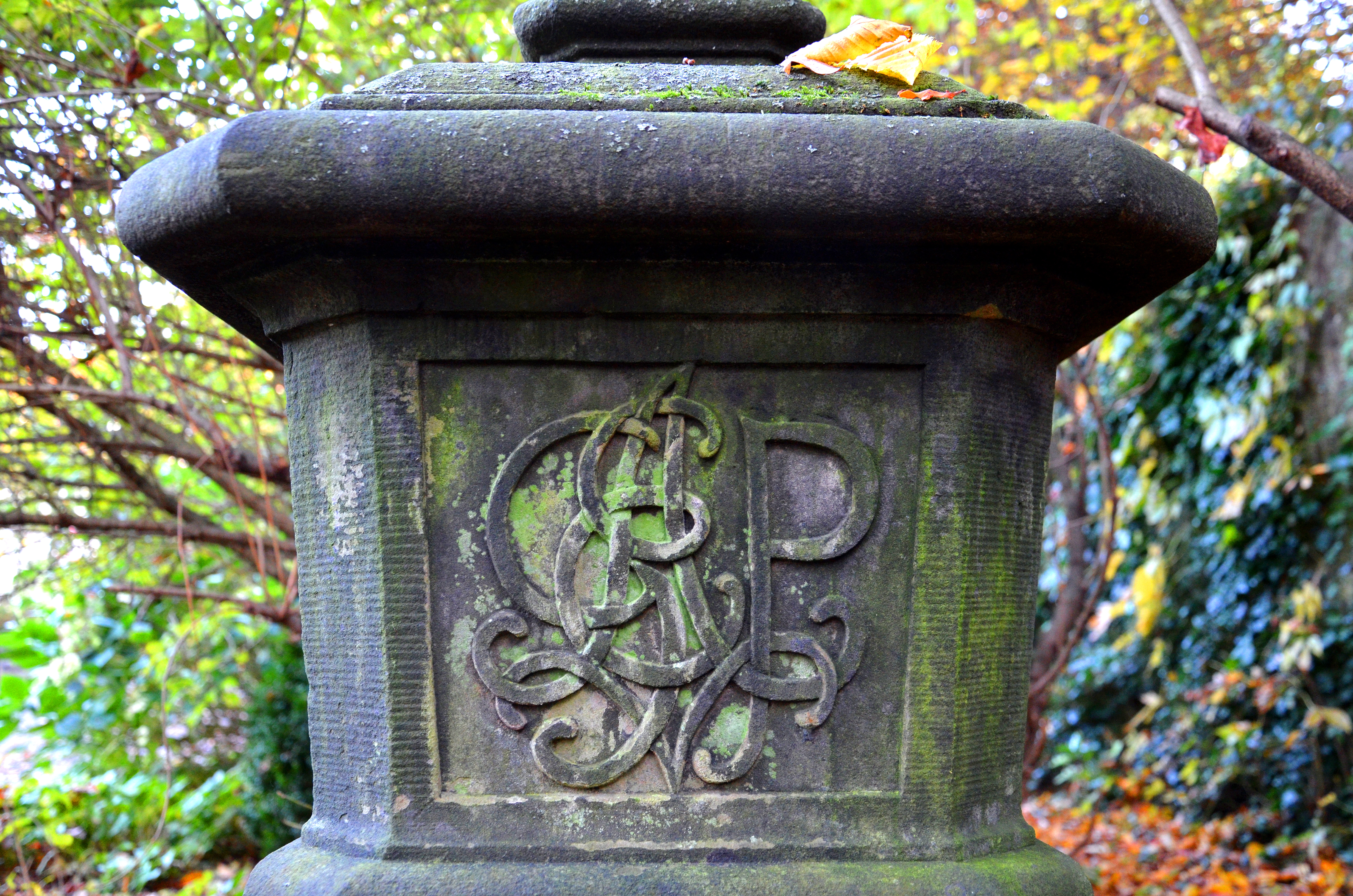 Schmuckelement im Von-Alten-Garten, hier gesehen an der Stelle des ehemaligen großen Gartensaales vom Lindener Schloss. Die aus Sandstein gehauene Skulptur trägt die Inschriften "Anno 1718" sowie die Initialen GEVP" von Graf Ernst von Platen(Hallermund) (* 3. August 1674; † 20. September 1726), dem Sohn des Schloss-Bauherren Franz-Ernst von Platen, Zum ist die Inschrift "1873 renov. eingehauen ...